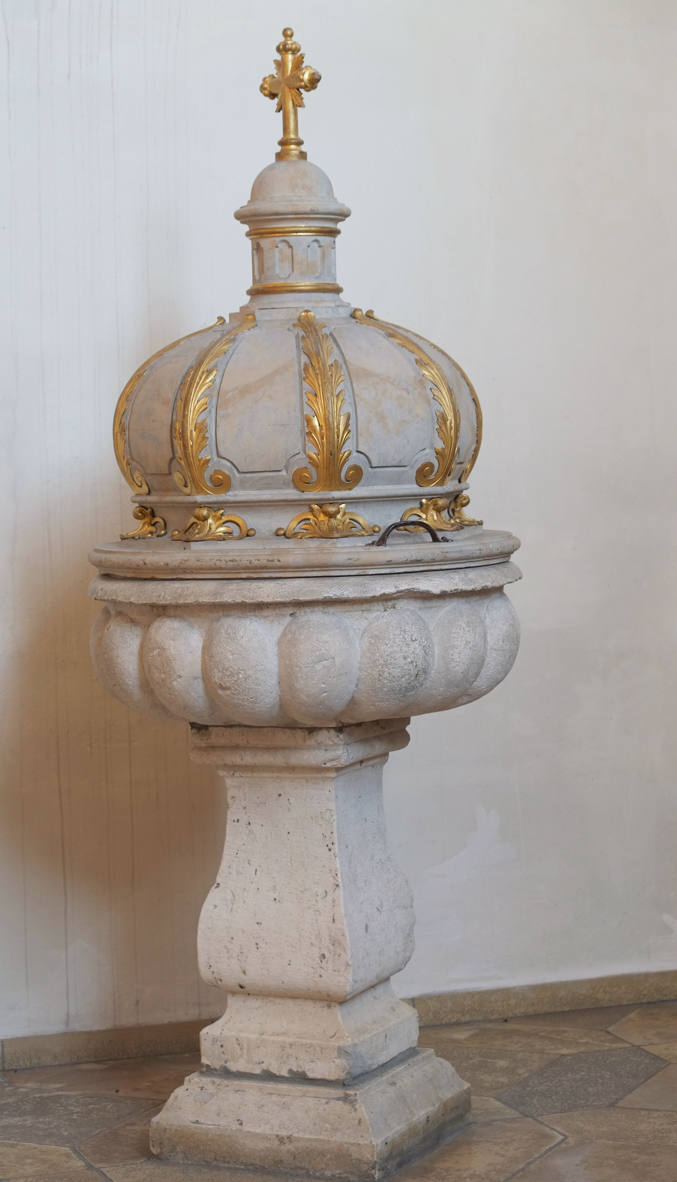 Katholische Pfarrkirche Kirche St. Martin in Blindheim im Landkreis Dillingen an der Donau (Bayern, Deutschland)